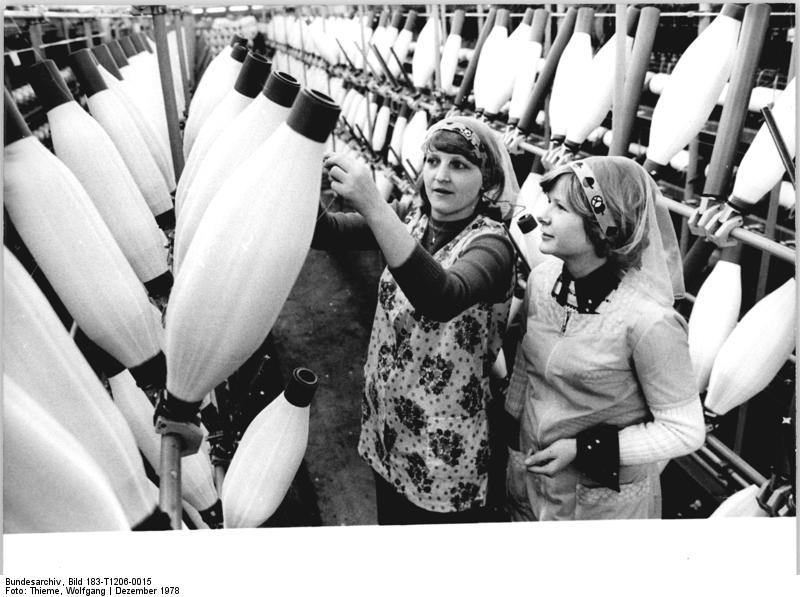 ADN-ZB-Thieme 6.12.1978-Bez. Karl-Marx-Stadt: Als Meisterin und als FDJ-Sekretär des Betriebes geschätzt wird Brigitte Kosin (r) -hier im Gespräch mit Zwirnerin Gabi Kulm- von ihren Kolleginnen. Nicht zuletzt die Jugendlichen aus der Zwirnerei haben großen Anteil daran, das der VEB Garnveredlungswerke Sehma im November mit dem Titel "Betrieb der ausgezeichneten Qualitätsarbeit" geehrt werden konnte. Das Kollektiv der 23jährigen Meisterin hat damit dem in diesem Jahr errungenen Ehrennamen "Hervorragendes Jugendkollektiv der DDR" alle Ehre gemacht.